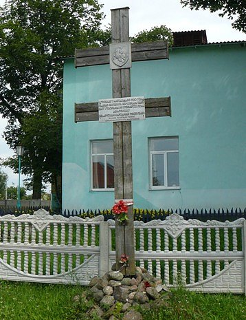 Грозов, Копыльский район, фото путешествия по Беларуси.